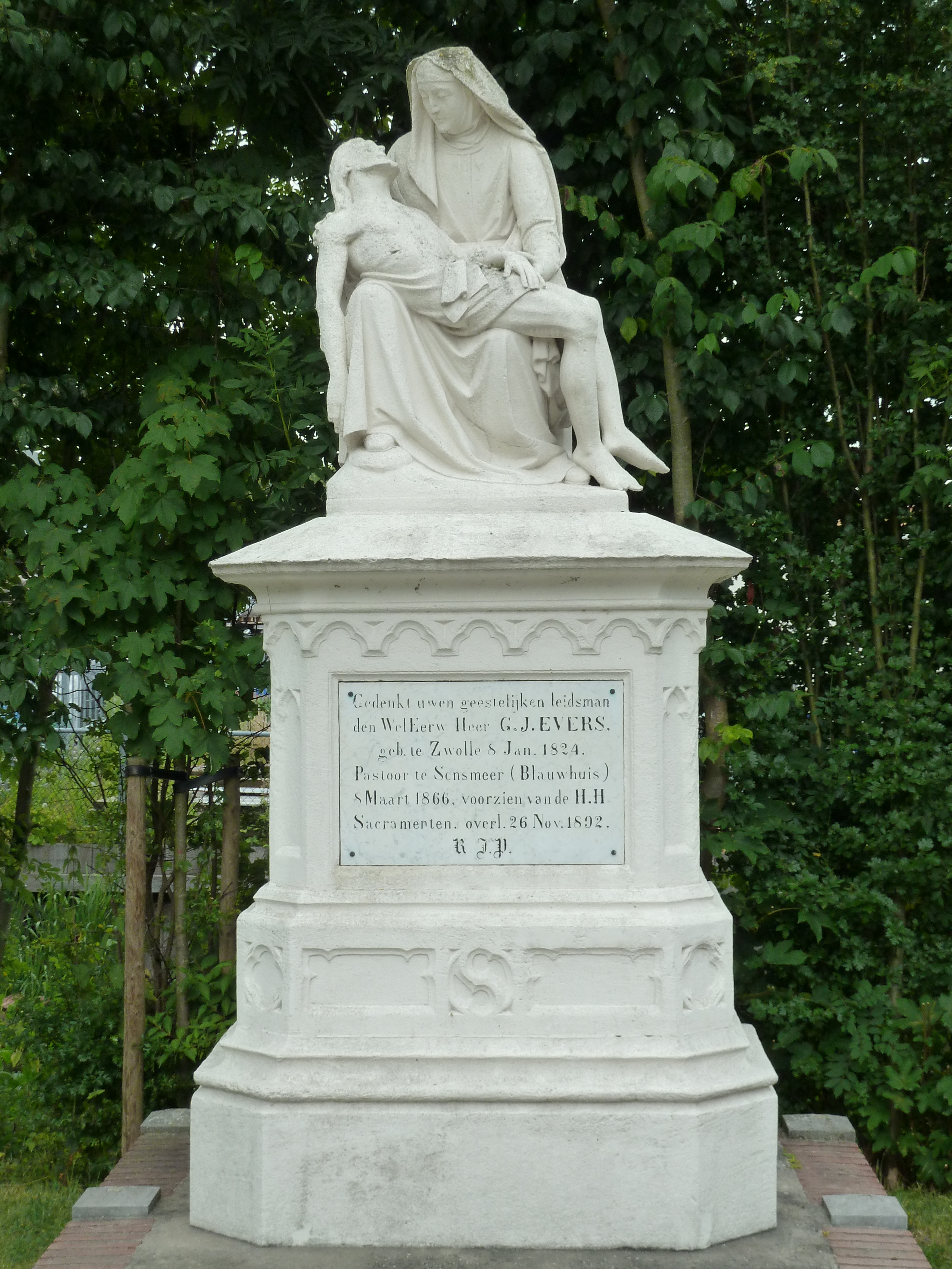 Blauwhuis: Piëta-grafmonument voor pastoor Evers